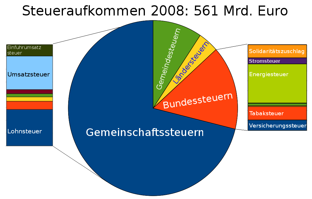 Steueraufkommen 2008. Daten aus